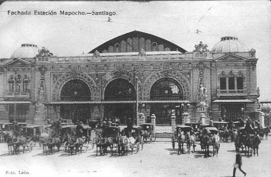 La estación Mapocho, lugar de origen y destino de los trenes a Valparaíso, el distante norte del país y el árido desierto de Atacama. Desde este lugar los viajeros salían a la costa, para abordar los buques que los conducirían a los destinos del mundo. Hoy este edificio a sido convertido en uno de los Centros Culturales más importantes de Santiago